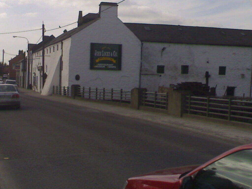 Kilbeggan de la rue